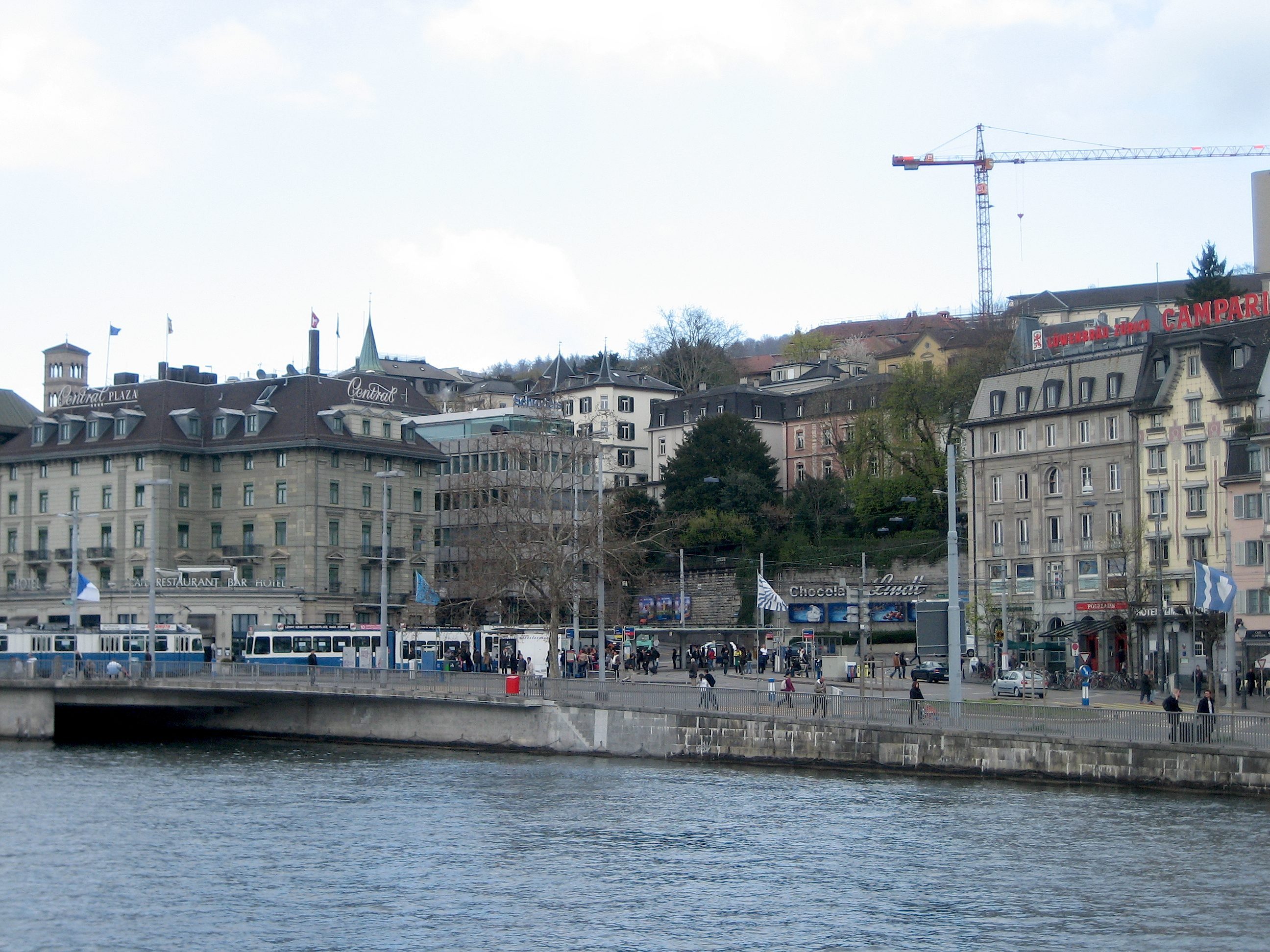 Das Central in Zürich, Blick nach Nordost